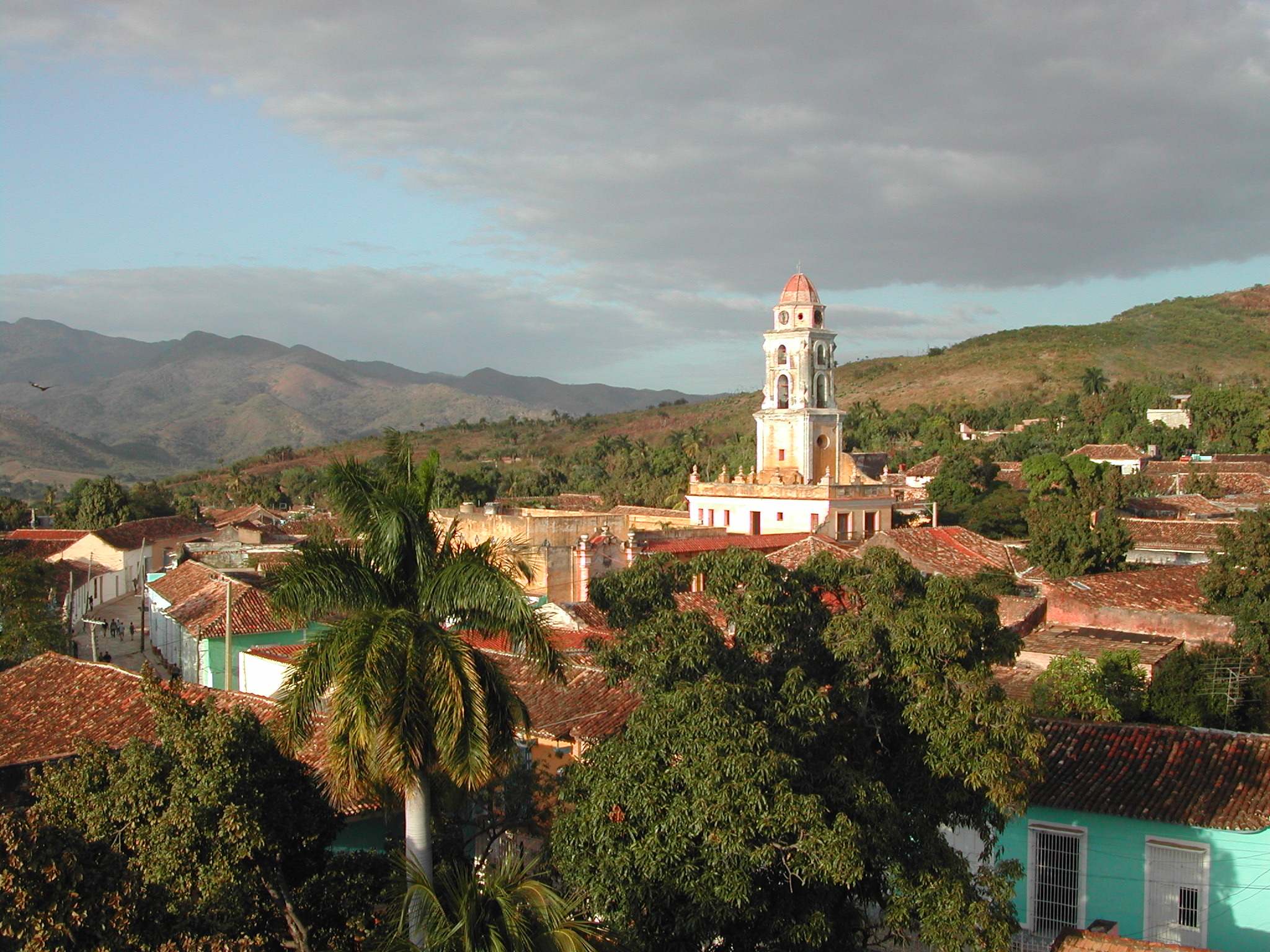 Trinidad (Cuba), Cuba